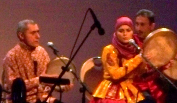 Алим Гасымов с дочкой Ферганой